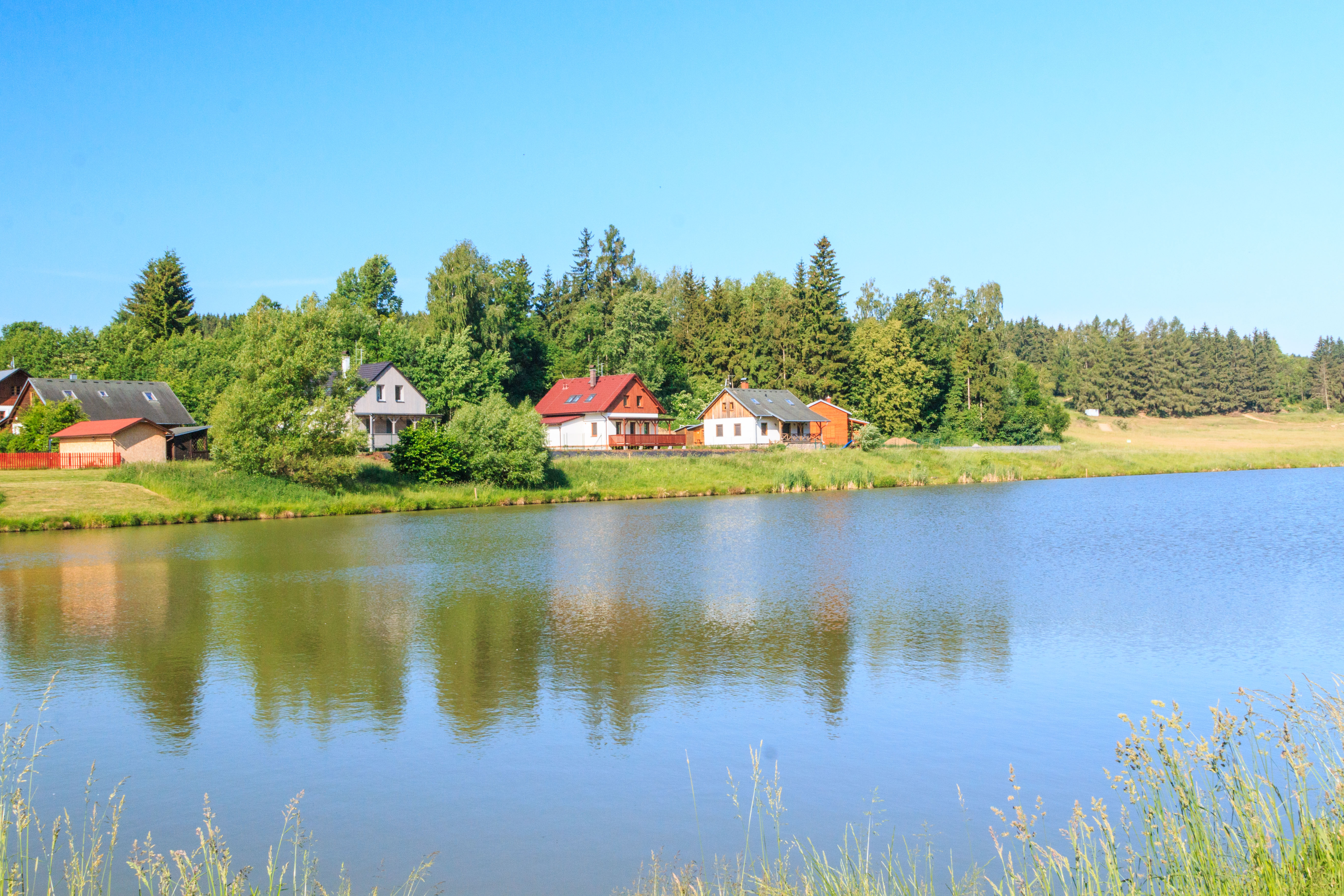 Přehrada Pod kopcem u Poličky Project: Vodstvo.